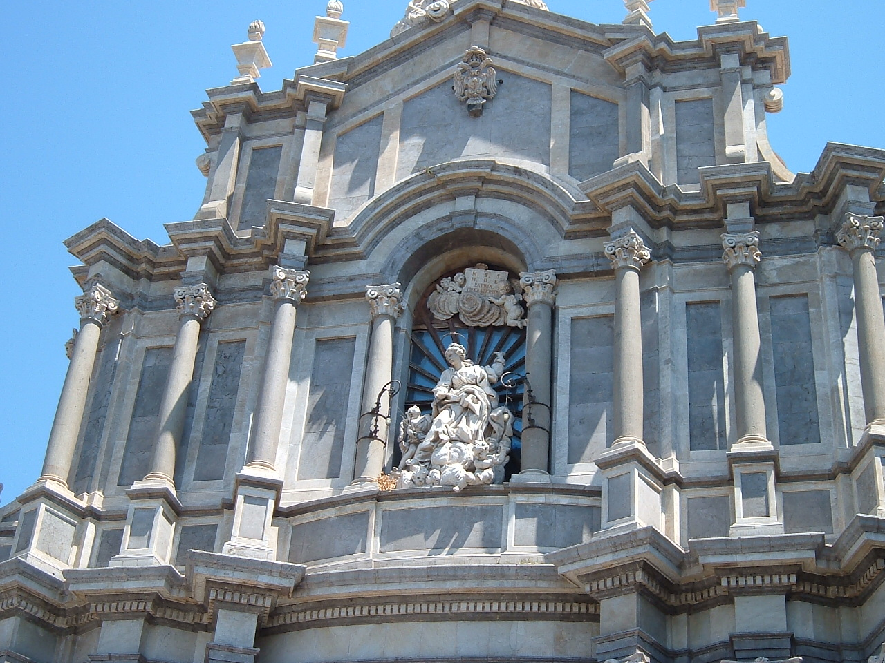 Particolare della facciata del Duomo di Catania (Italia).